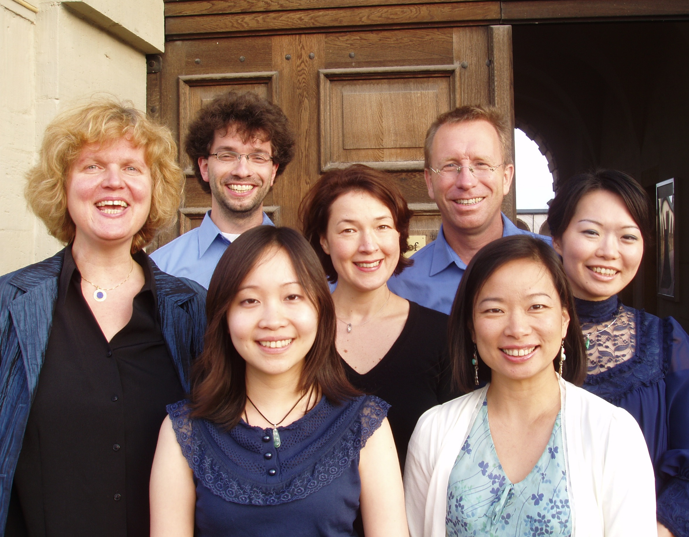 Avensburger Kammersolisten